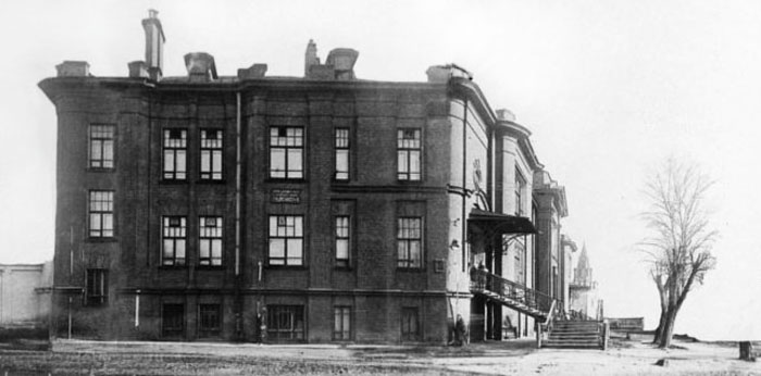 Преображенская больница. Преображенский вал, 19. Фото начала XIX века